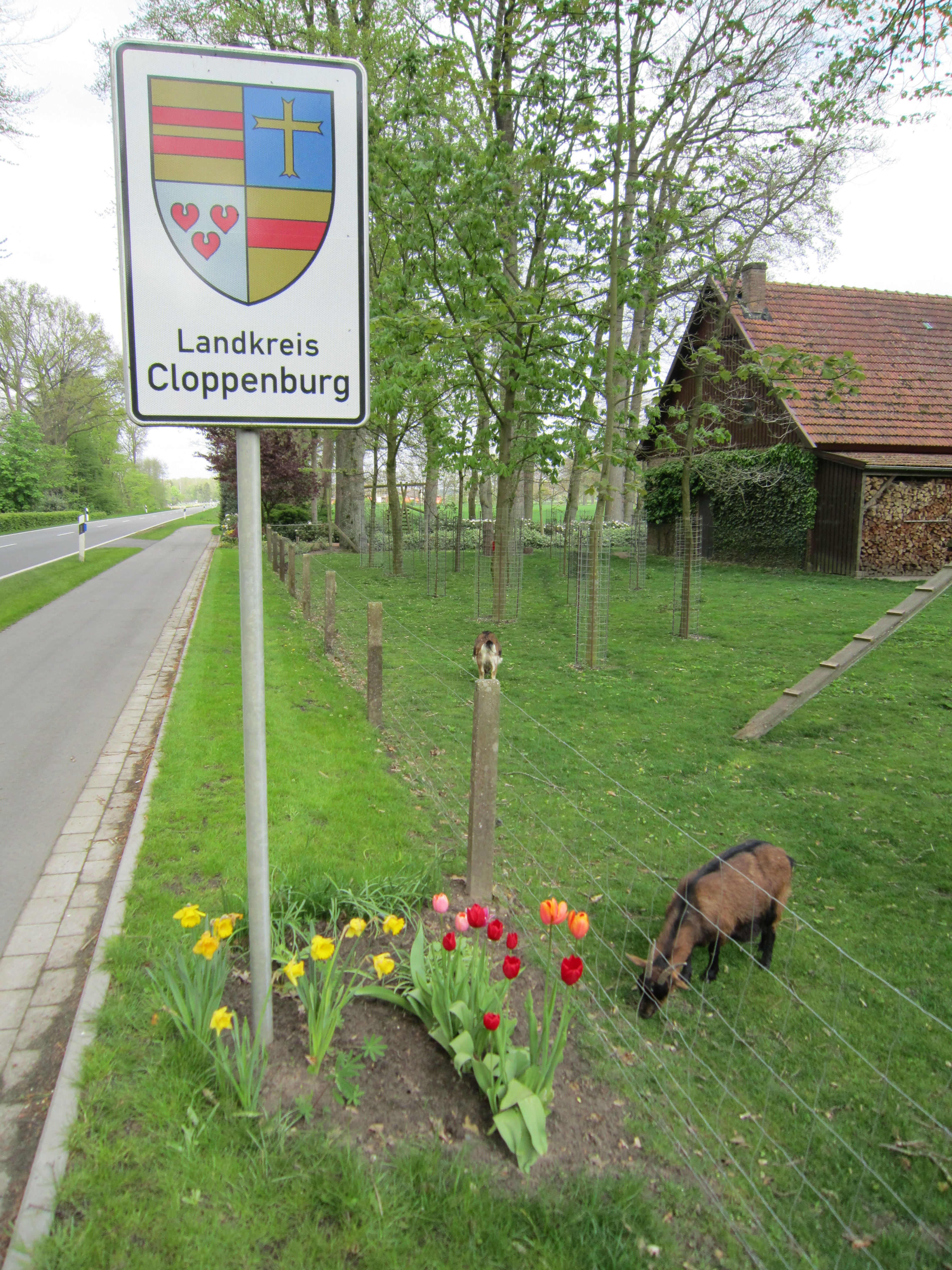 Kreisgrenze an der Artlandstraße in Essen (Oldenburg)